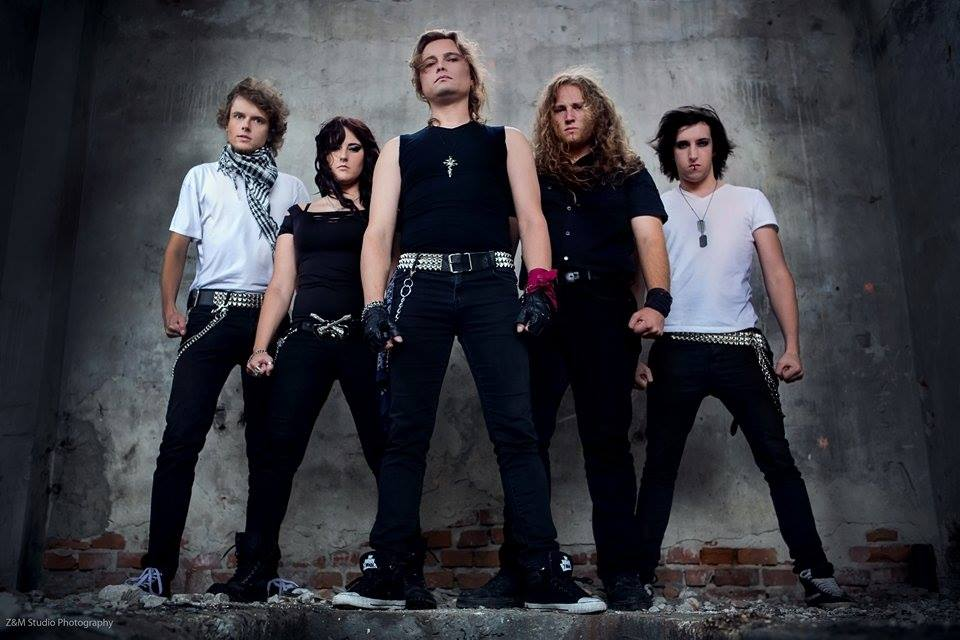 Kapela Eufory v roku 2014